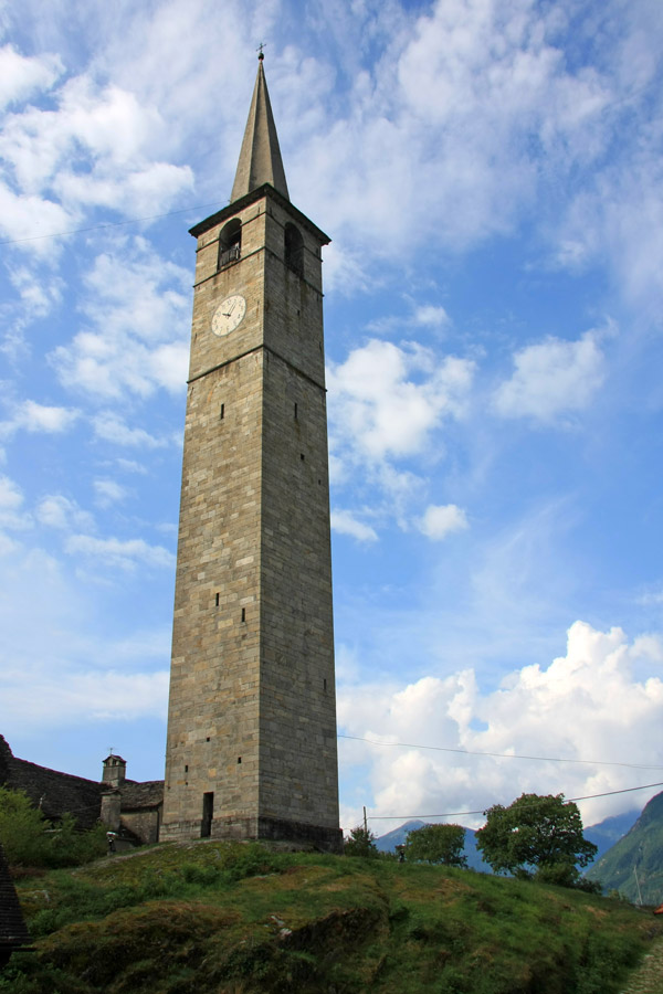 Il Campanile di Montecrestese (VB), con i sui 67 metri è considerato il più alto dell'Ossola